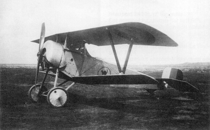 Francuski samolot myśliwski Nieuport 11C1.